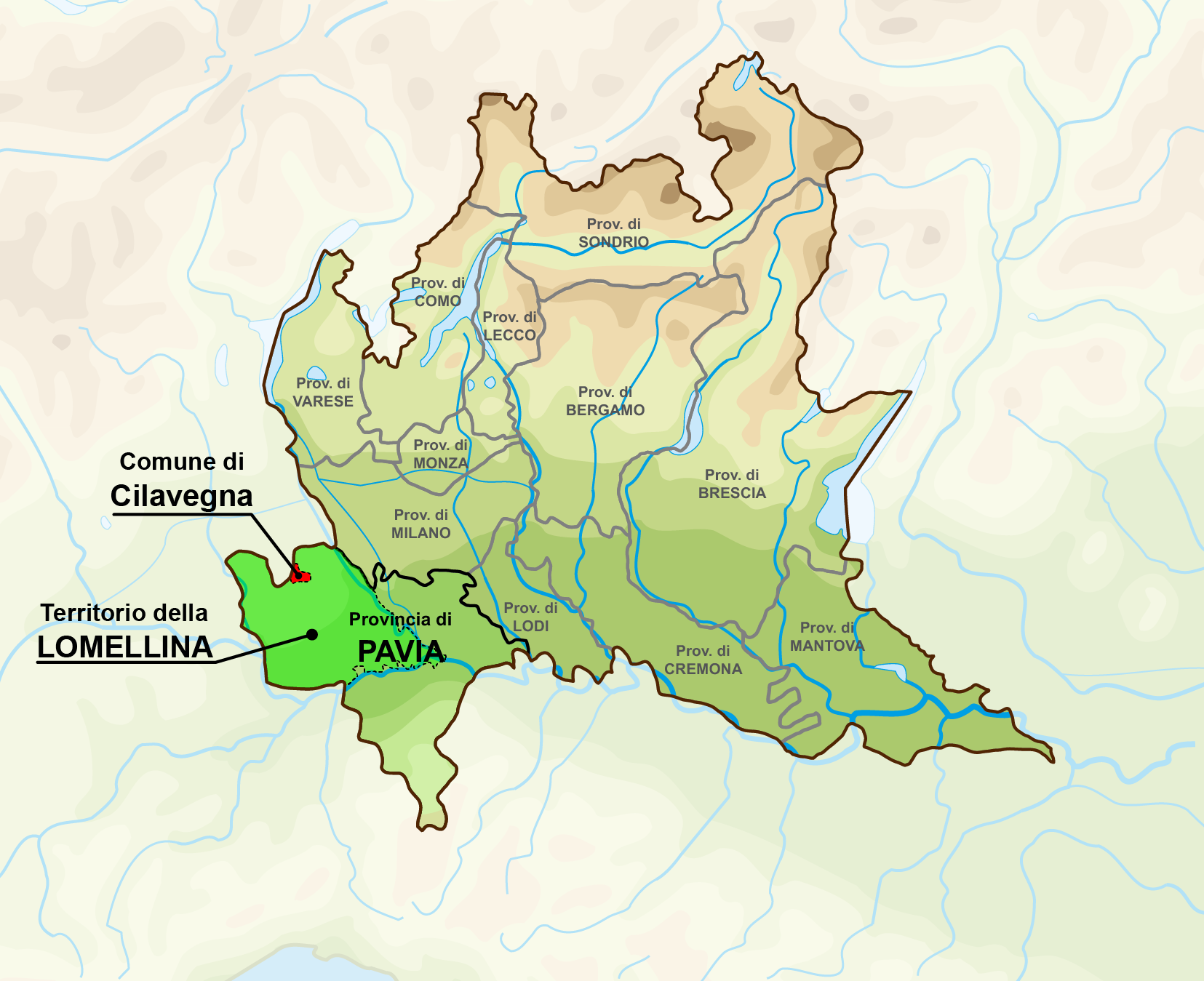 Con il colore rosso; i confini del comune di Cilavegna che si trova sul territorio della Lomellina in provincia di Pavia nella regione Lombardia (Italia).